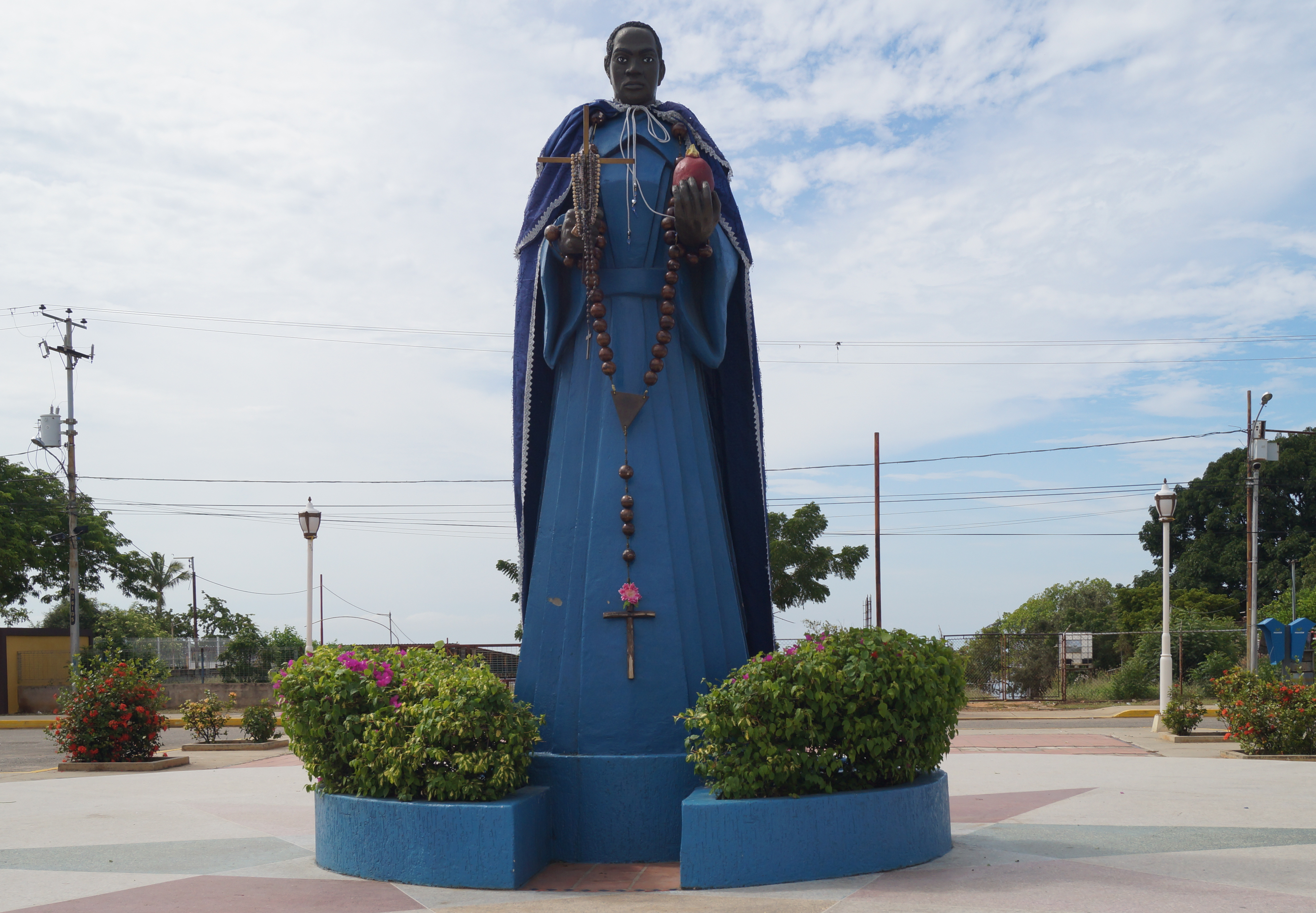 San Benito de Palermo. Estatua ubicada en el municipio Santa Rita, Av Pedro Lucas Urribarrí. Puerto Escondido. Estado Zulia